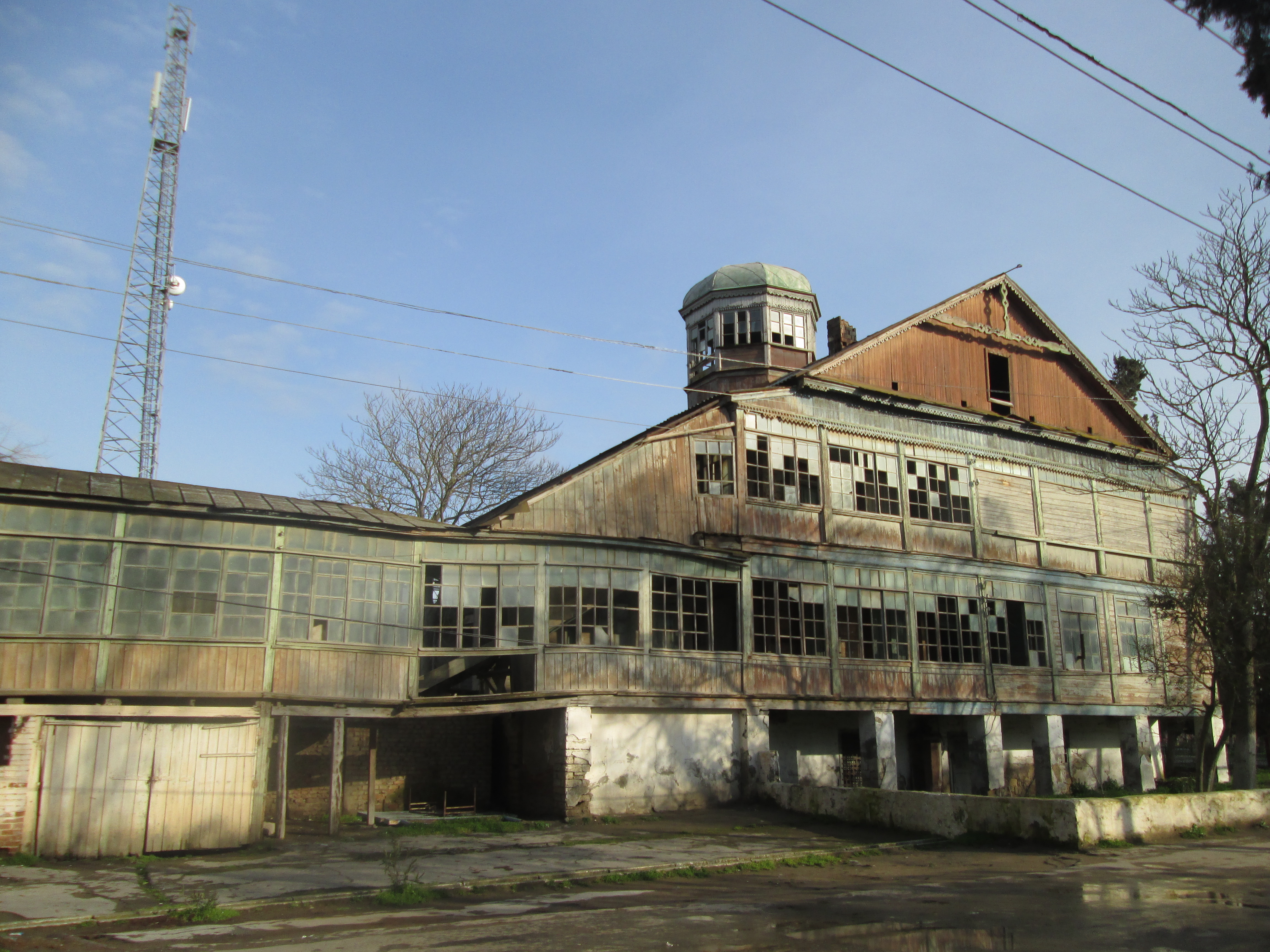 H.Z.Tağıyev adına Bankə Balıq Kombinatının inzibati binası